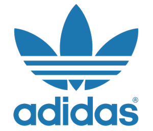 Логотип компании Adidas, т.н. "Трилистник"